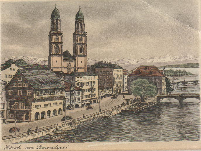 Zürich am Limmatquai. Der alte Stich zeigt das östliche Limmatufer von Zürichs Innenstadt. Vor dem Grossmünster liegen links einige Zunfhäuser. Rechts sind die Münsterbrücke und das Helmhaus dargestellt. Im Hintergrund ist die Quaibrücke, der Zürichsee, das Zürichhorn und die Glarner Alpen zu erkennen. Das Limmatquai, von einigen wenigen Autos befahren, ist seit September 2004 autofrei. Es ist jetzt den Fussgängern und Trams vorbehalten, die in der Grafik ebenfalls zu erkennen sind Lizenz: Public Domain